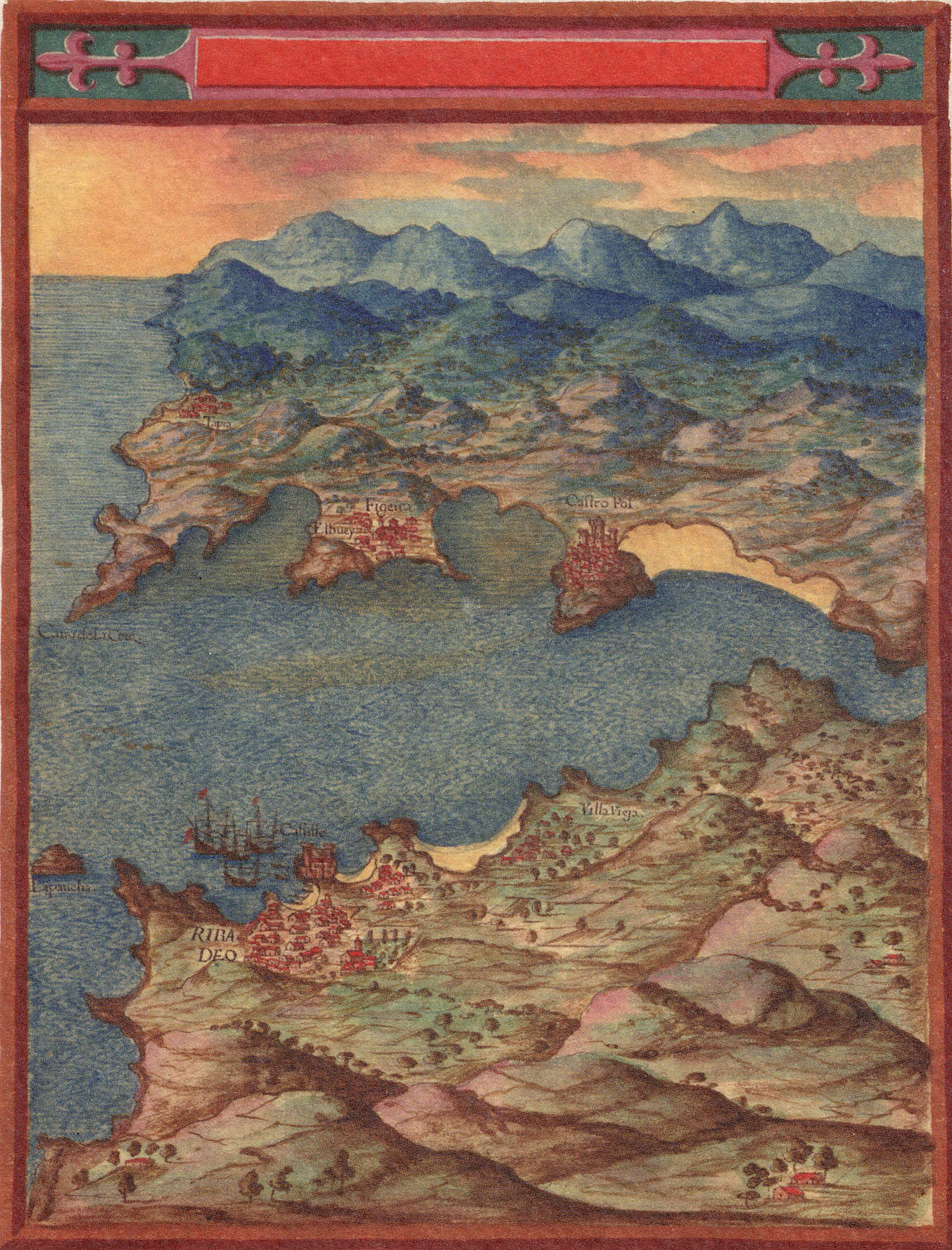 Vista aérea de la Ría del Eo desde el Oeste